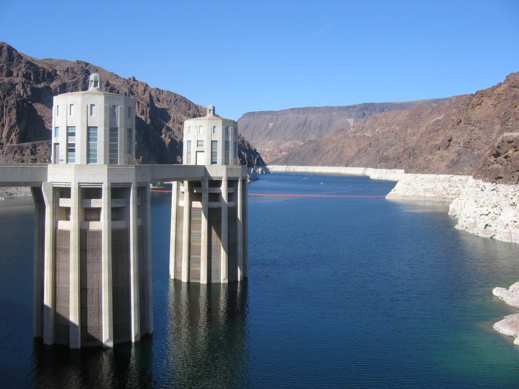 Hoover Dam, USA